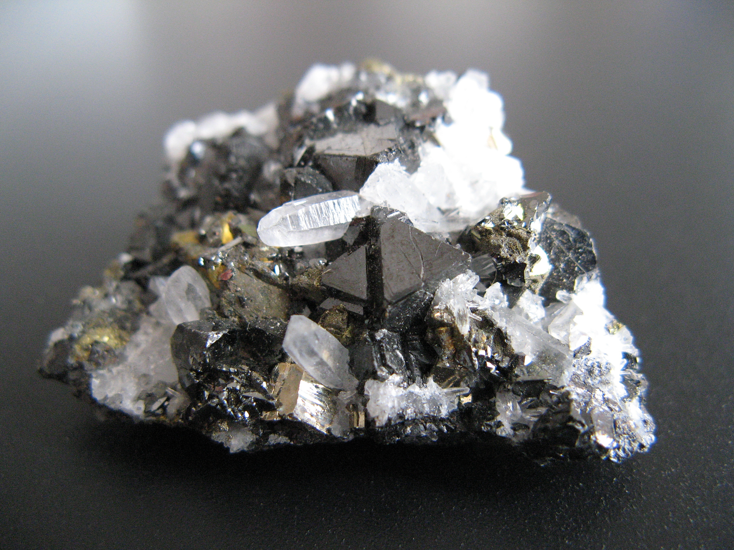 Tetraedrita (procedência desconhecida).